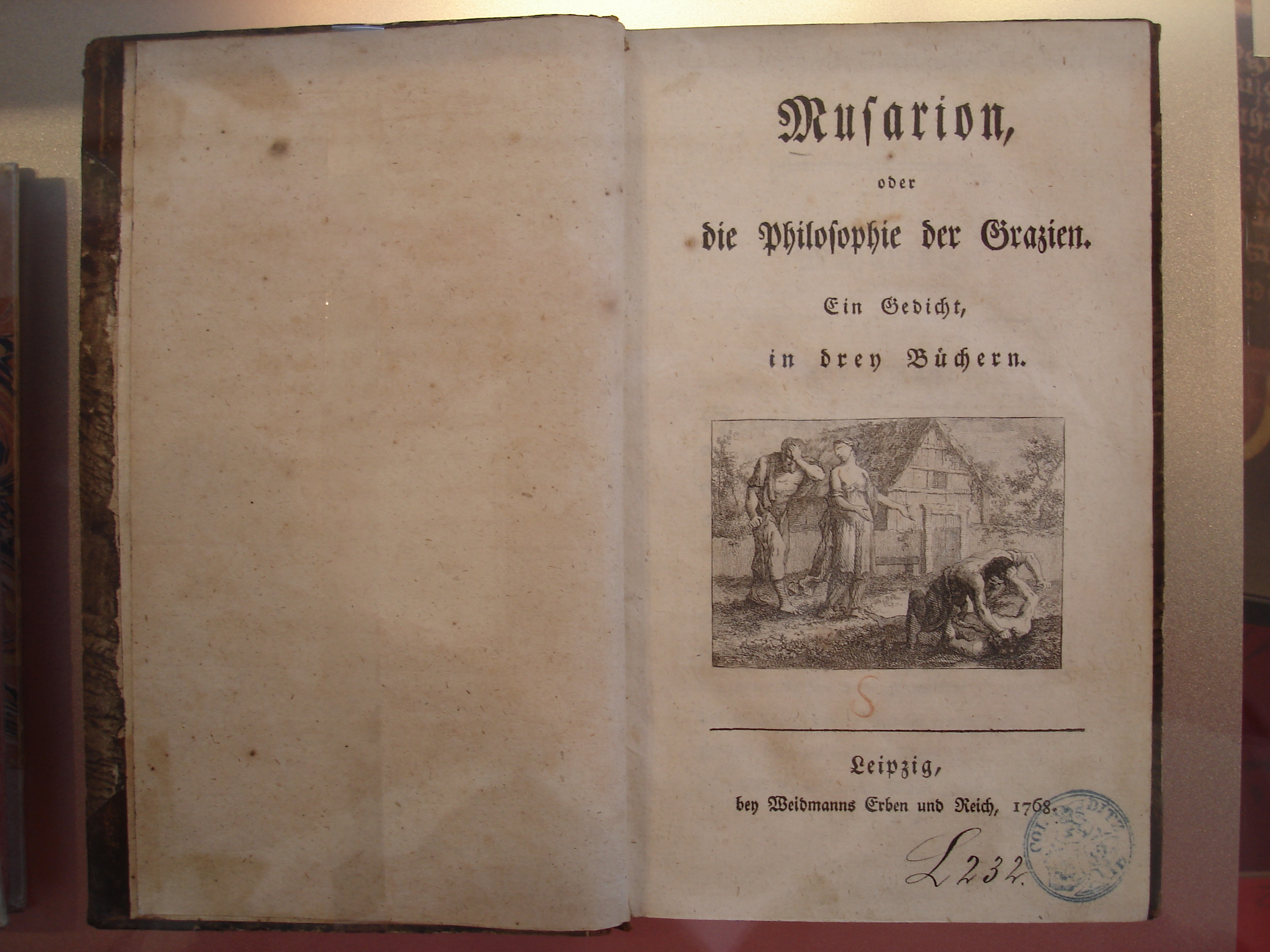 Titelblatt von Wielands Verserzählung "Musarion"